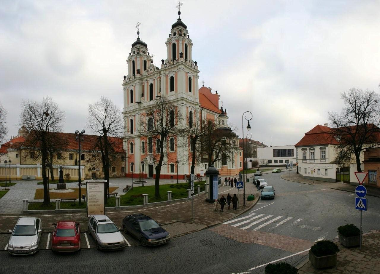 Vilnius, Karolinos bažnyčia; Vilnius, Caroline Church